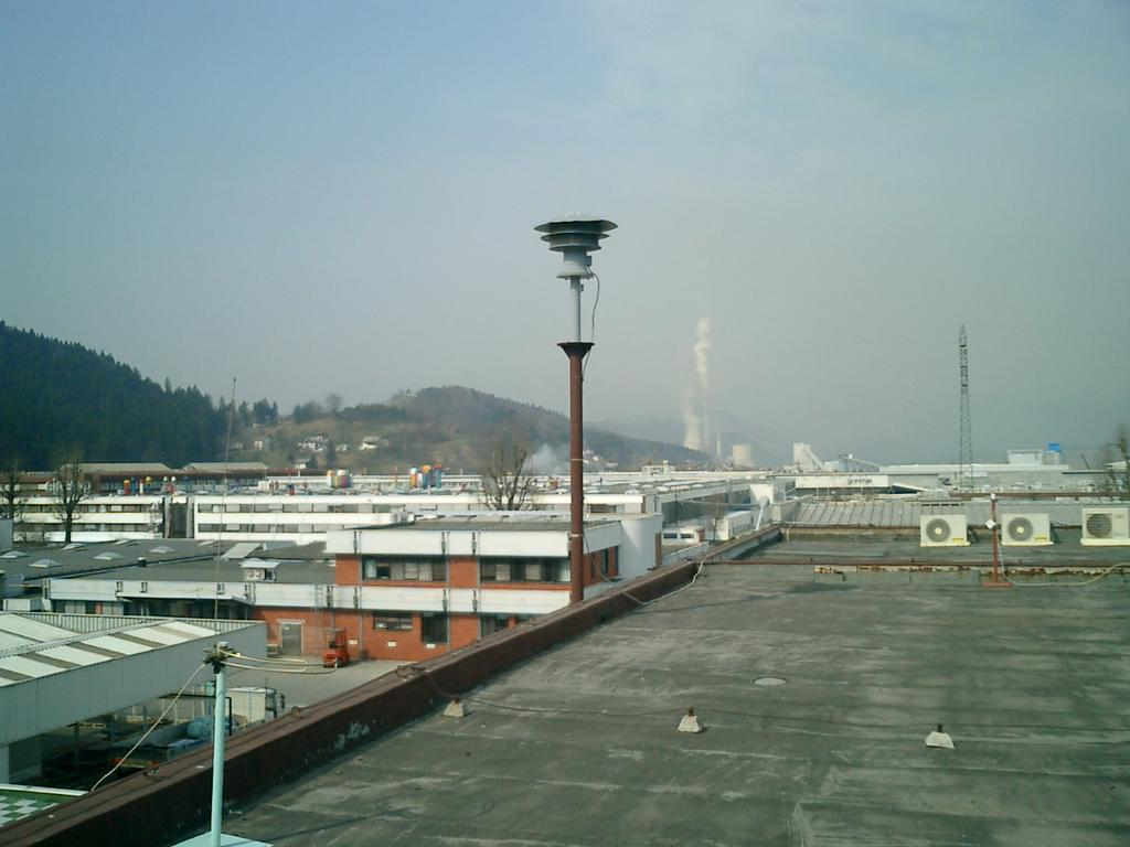 Slikano iz strehe Gorenja v Velenju.